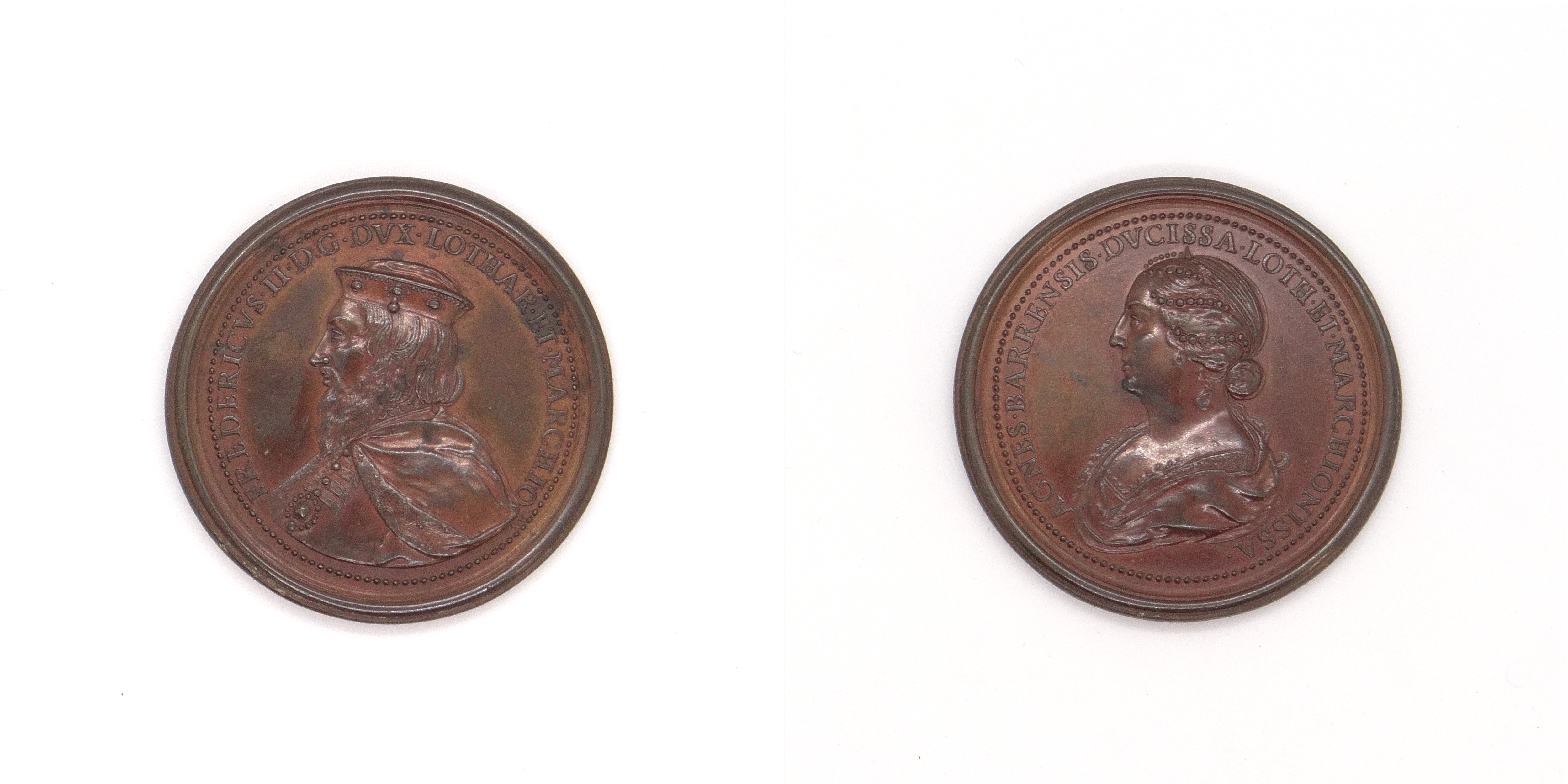 Médaille en bronze, graveur probablement Ferdinand de Saint Urbain (source : Histoire métallique de l'Europe, ou catalogue des médailles modernes qui composent le cabinet de feu M. Poulhariés, écuyer et négociant de Marseille, page 322, 1767) Avers : homme de profil gauche, inscription « Fredericus III · DG Dux Loth Et Marchion » (Frédéric II ou Ferry II de Lorraine) Revers : femme de profil gauche, inscription « Agnes Barrensis Ducissa Loth Et Marchionissa » (Agnès de Bar)